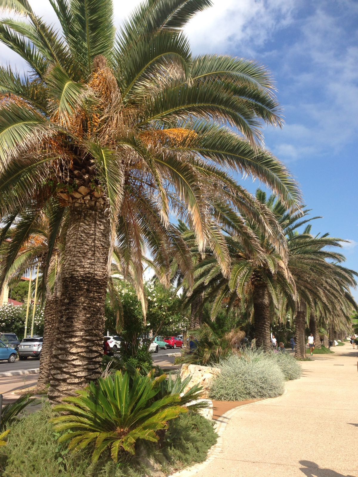 Palma delle Canarie e palma da datteri, viale Trieste This is a photo of a monument which is part of cultural heritage of Italy.